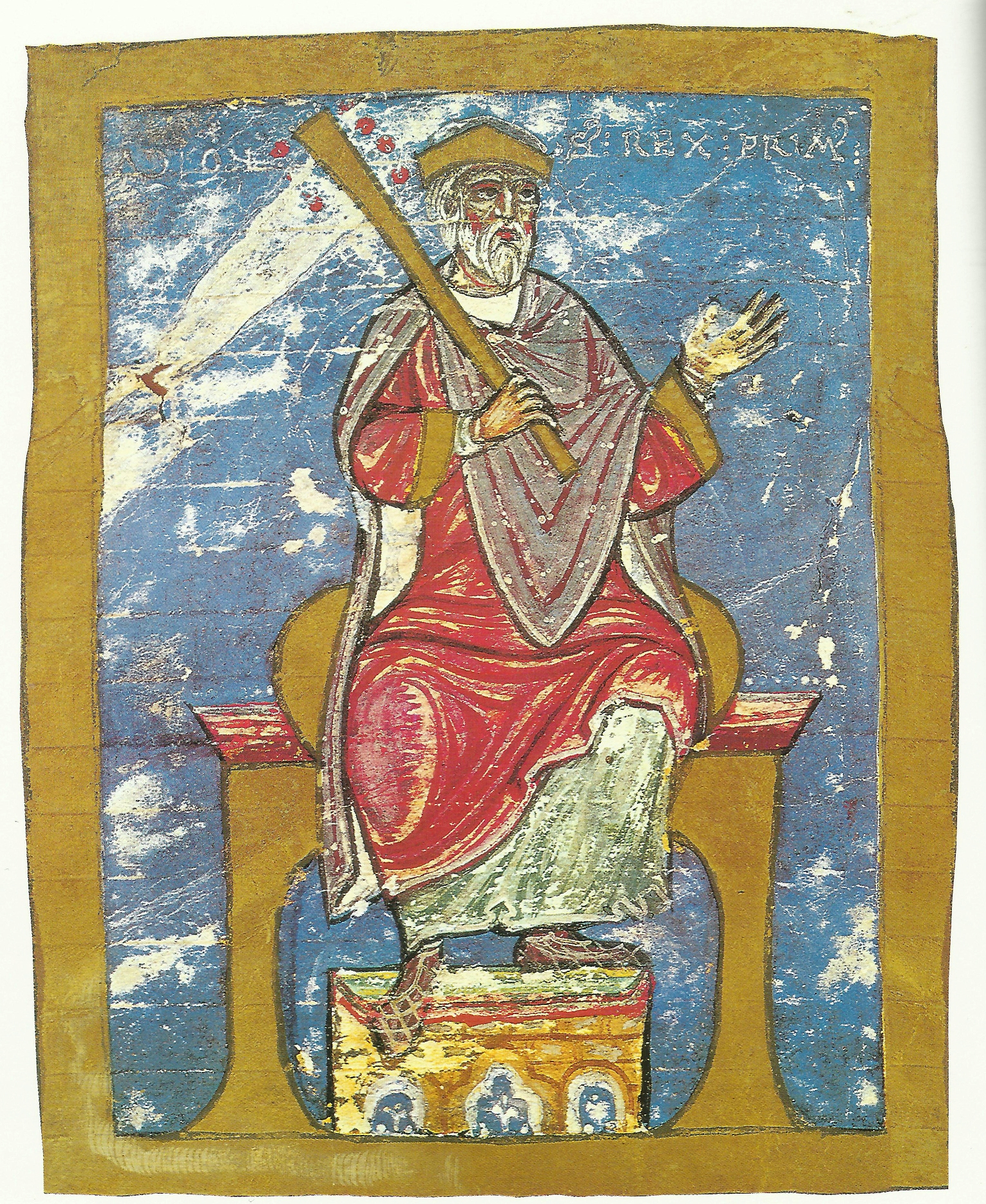 Miniatura do rei Afonso II o Casto, de Oviedo (760-842), no Tumbo A da Catedral de Santiago de Compostela